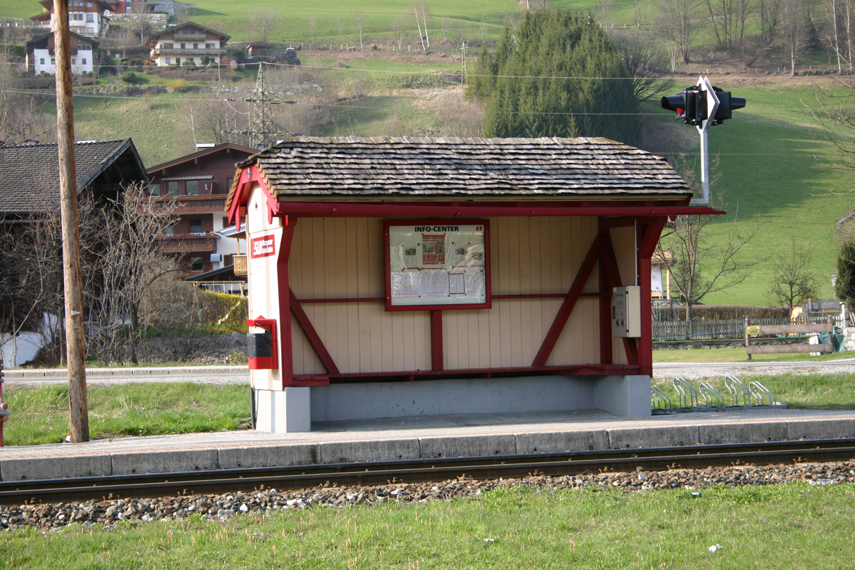 Beispiel einer neu bemalten Haltestelle der Pinzgauer Lokalbahn